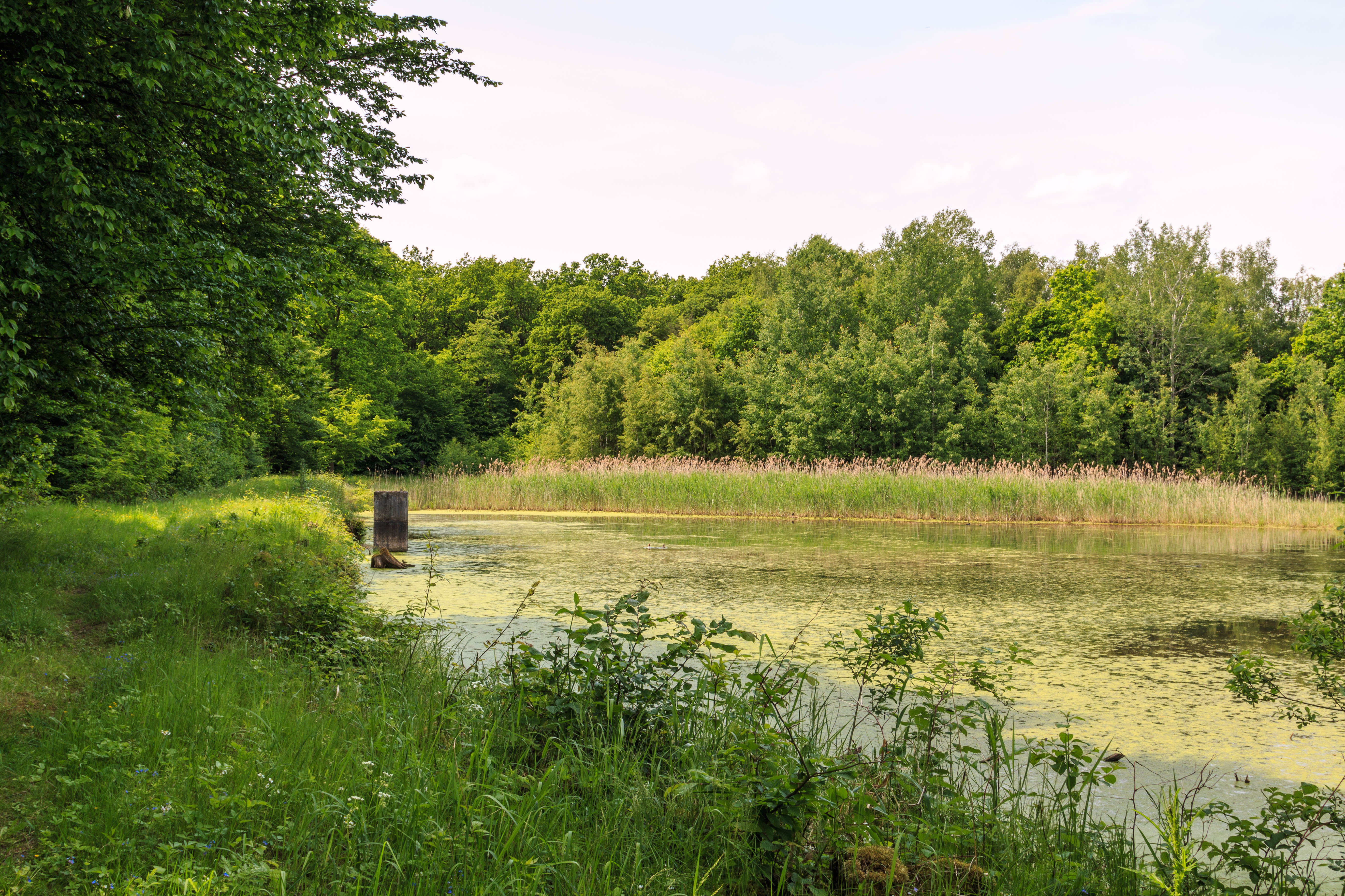 Přírodní památka Kanice Project: Chráněná území.